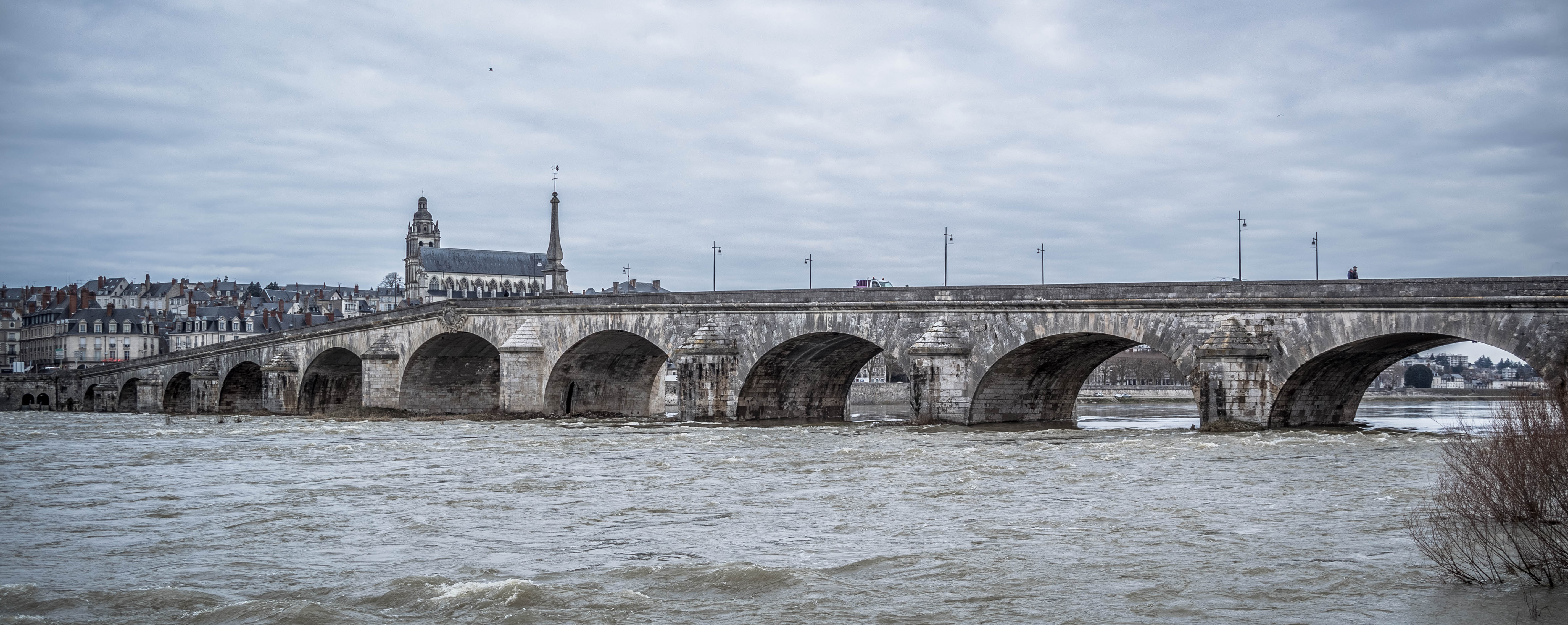 Panorama du pont Jacques Gabriel, Mars 2016 Crédit Photo: Jérémie Averty